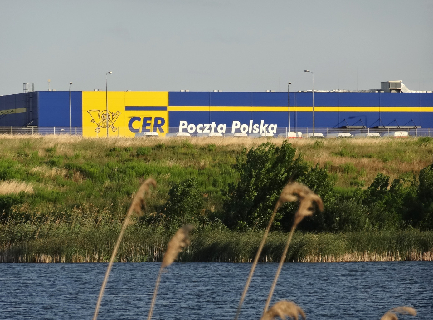 Centrum sortowania Poczty Polskiej w Lisim Ogonie koło Bydgoszczy